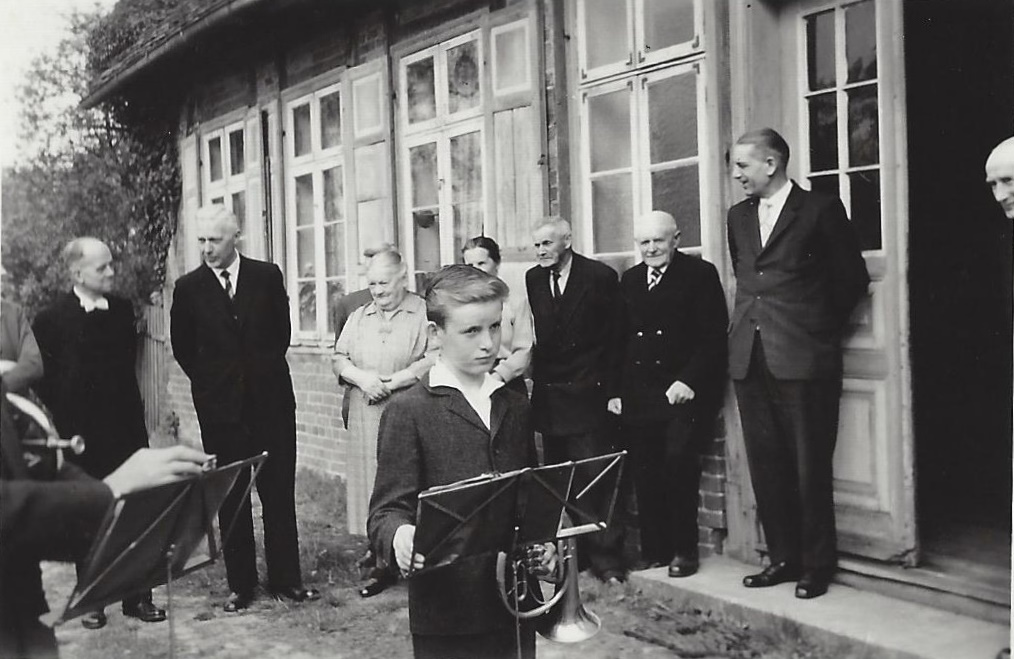 Pastorentreffen in Kreien: Superintendent Martin Voss (Parchim), Karl Timm (Plau am See), Niemann (Kreien). Der Junge und die vier Alten in der Mitte sind nicht bekannt.